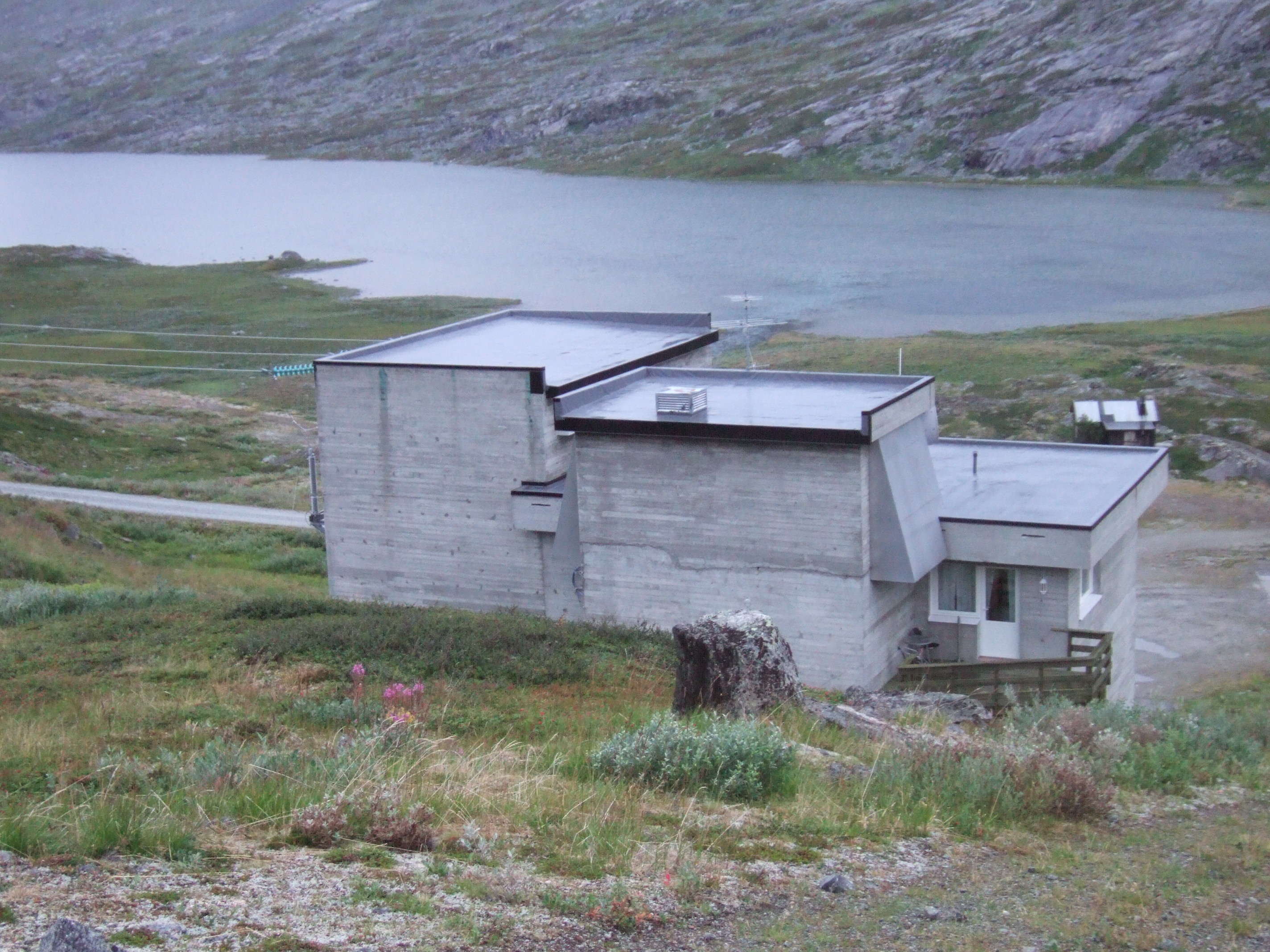 Båtsvatn Kraftverk ved Kobbvatnet i Narvikjella i Narvik kommune i Nordland.